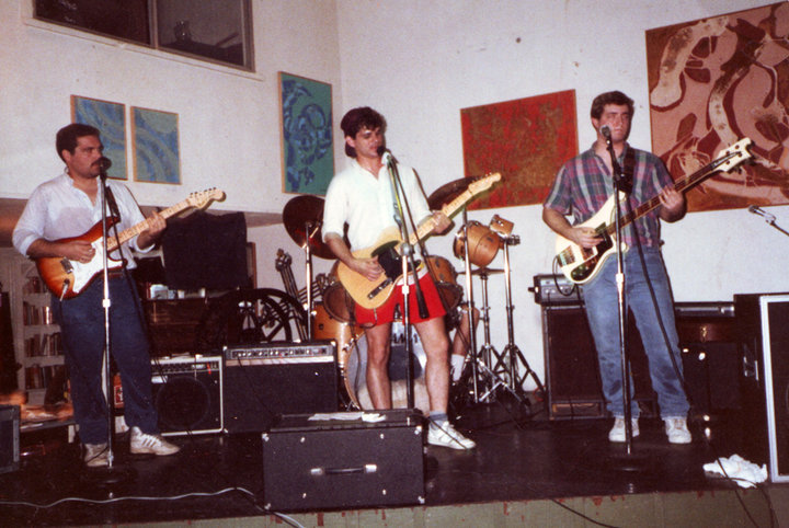 Original MOTO Cafe Brazil circa 1984